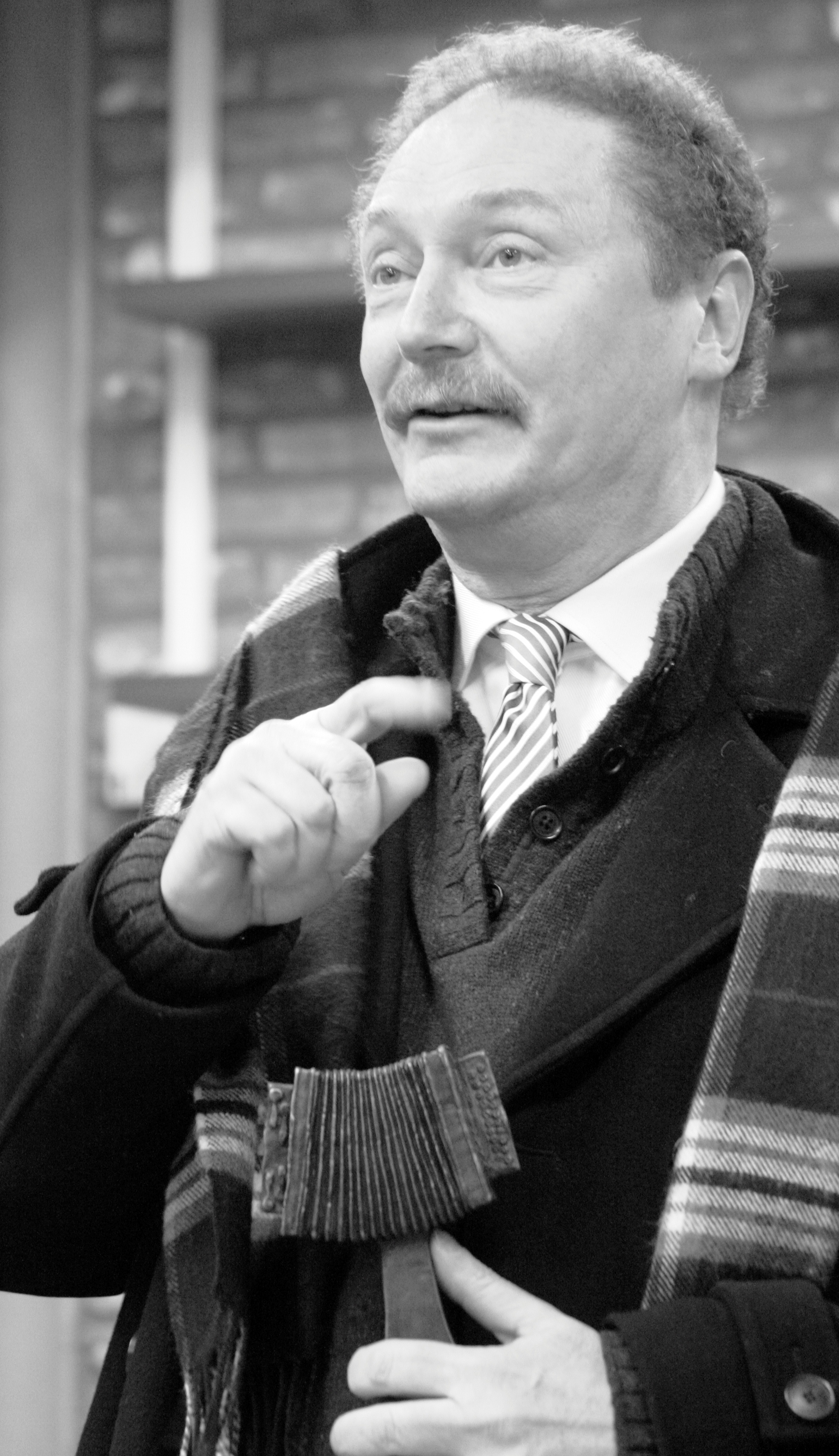 Sfeerbeeld